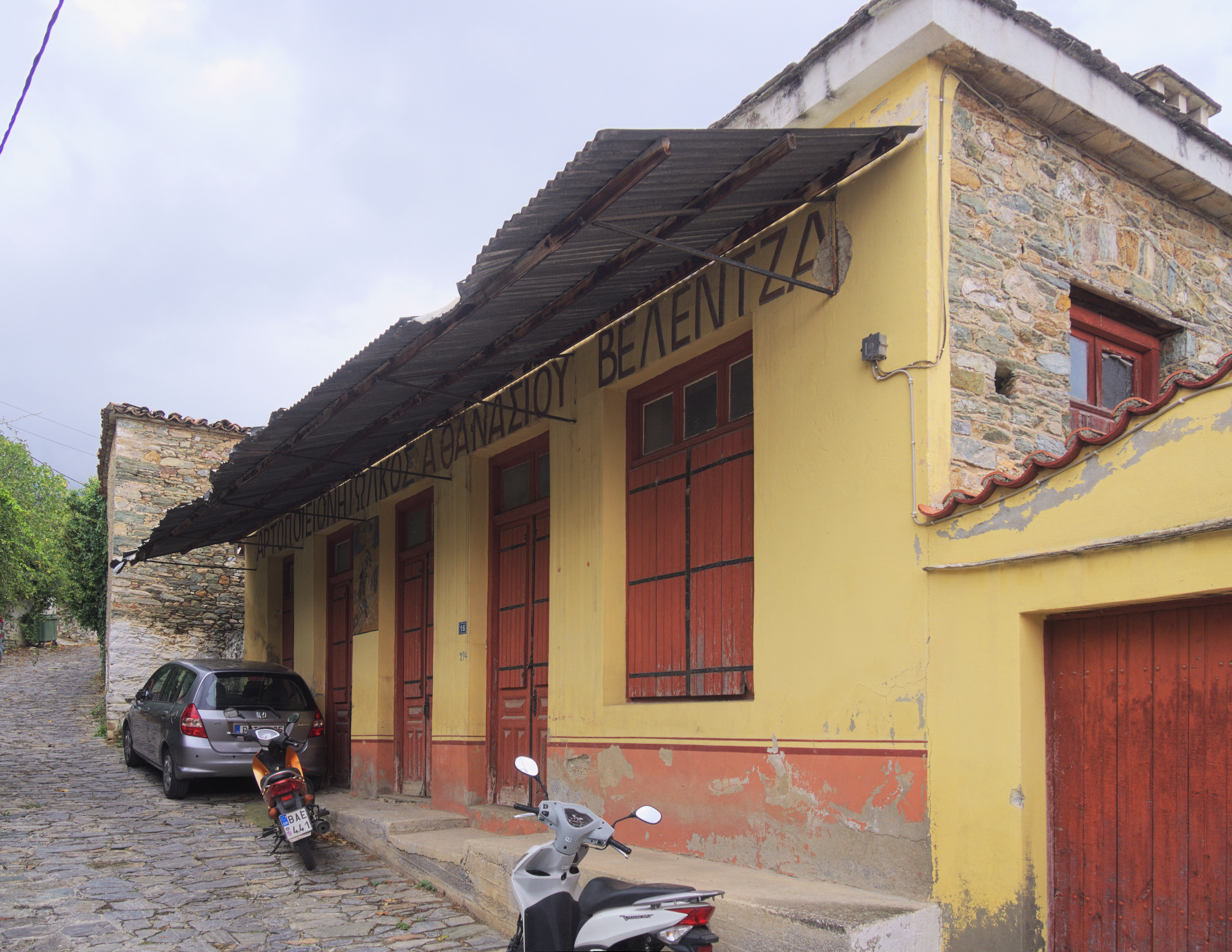 Φούρνος του Βελέντζα«Φούρνος του Βελέντζα»